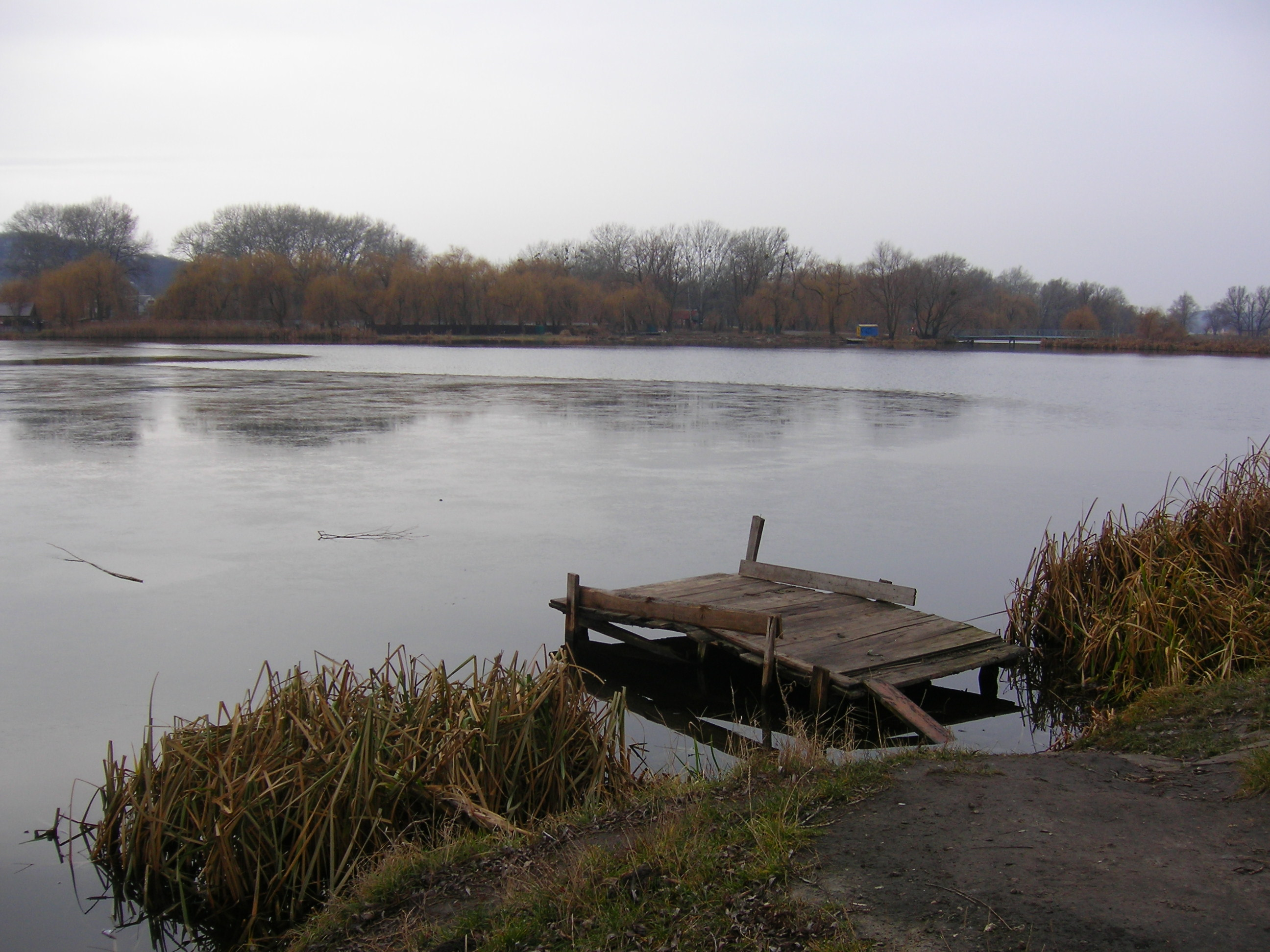 Річка Стугна у Василькові.